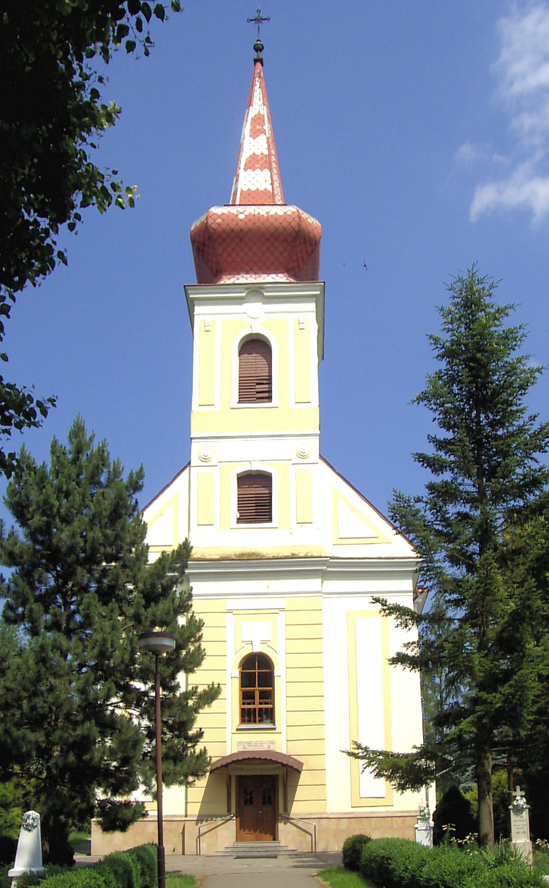 Rímskokatolícky kostol Košické Olšany